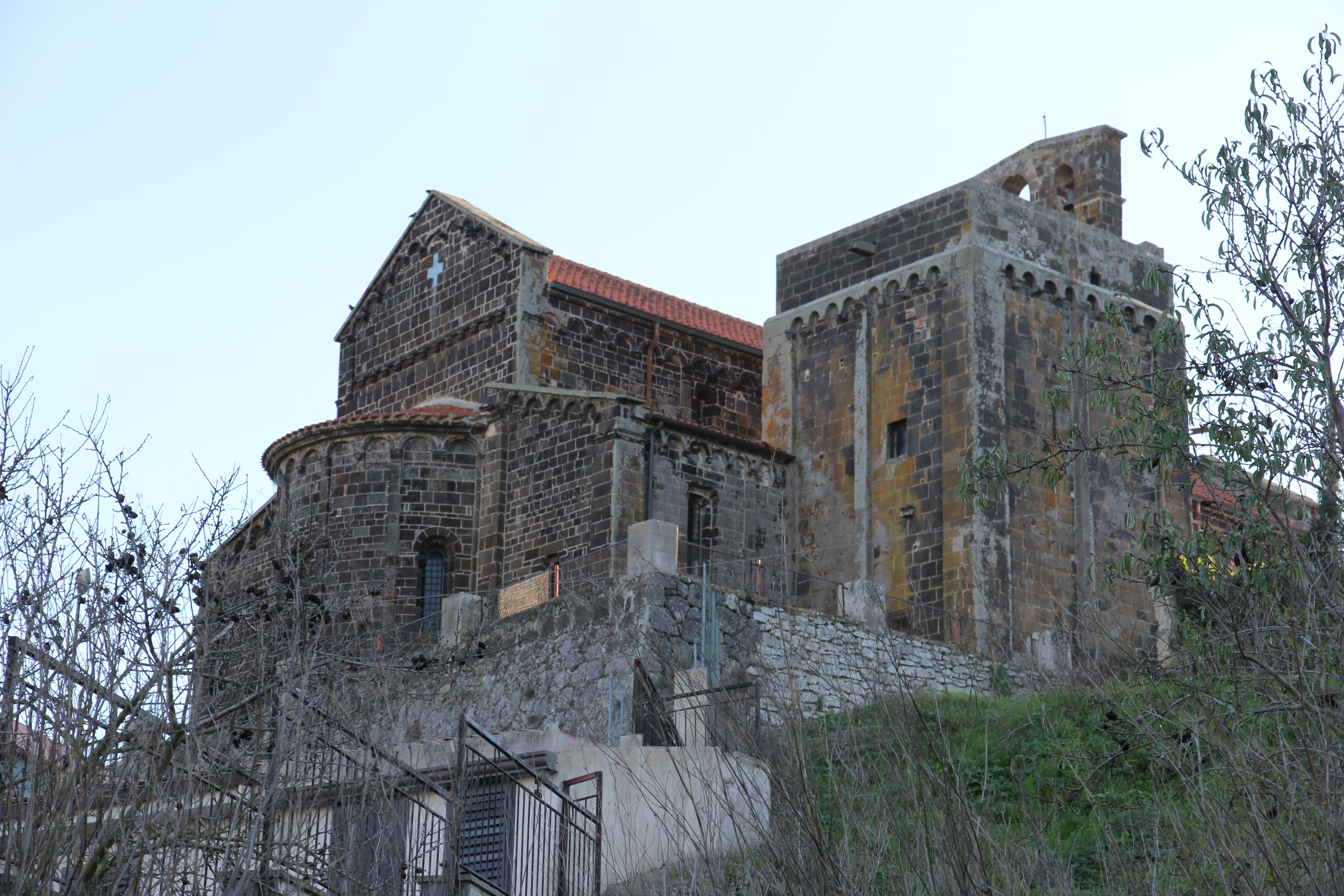 Ardara - Chiesa di Santa Maria del Regno